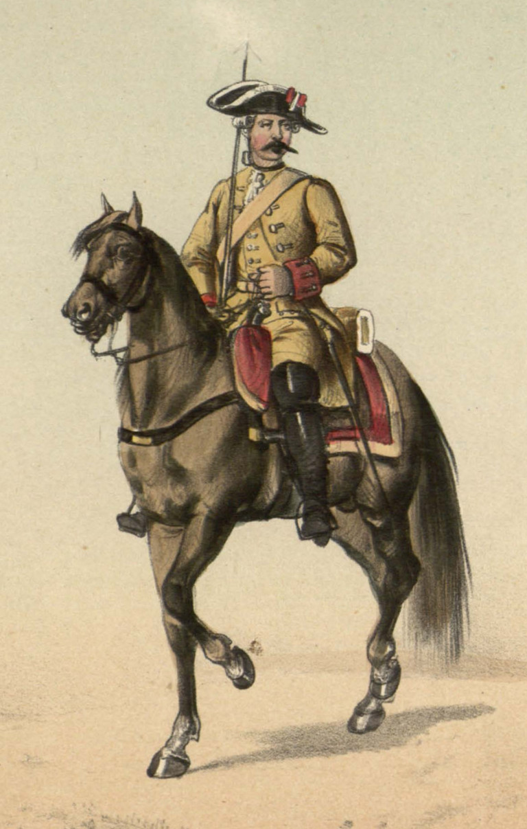 Farnesio de línea y Pavía de dragones, 1789